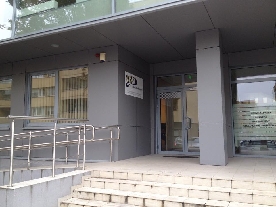 Administracija